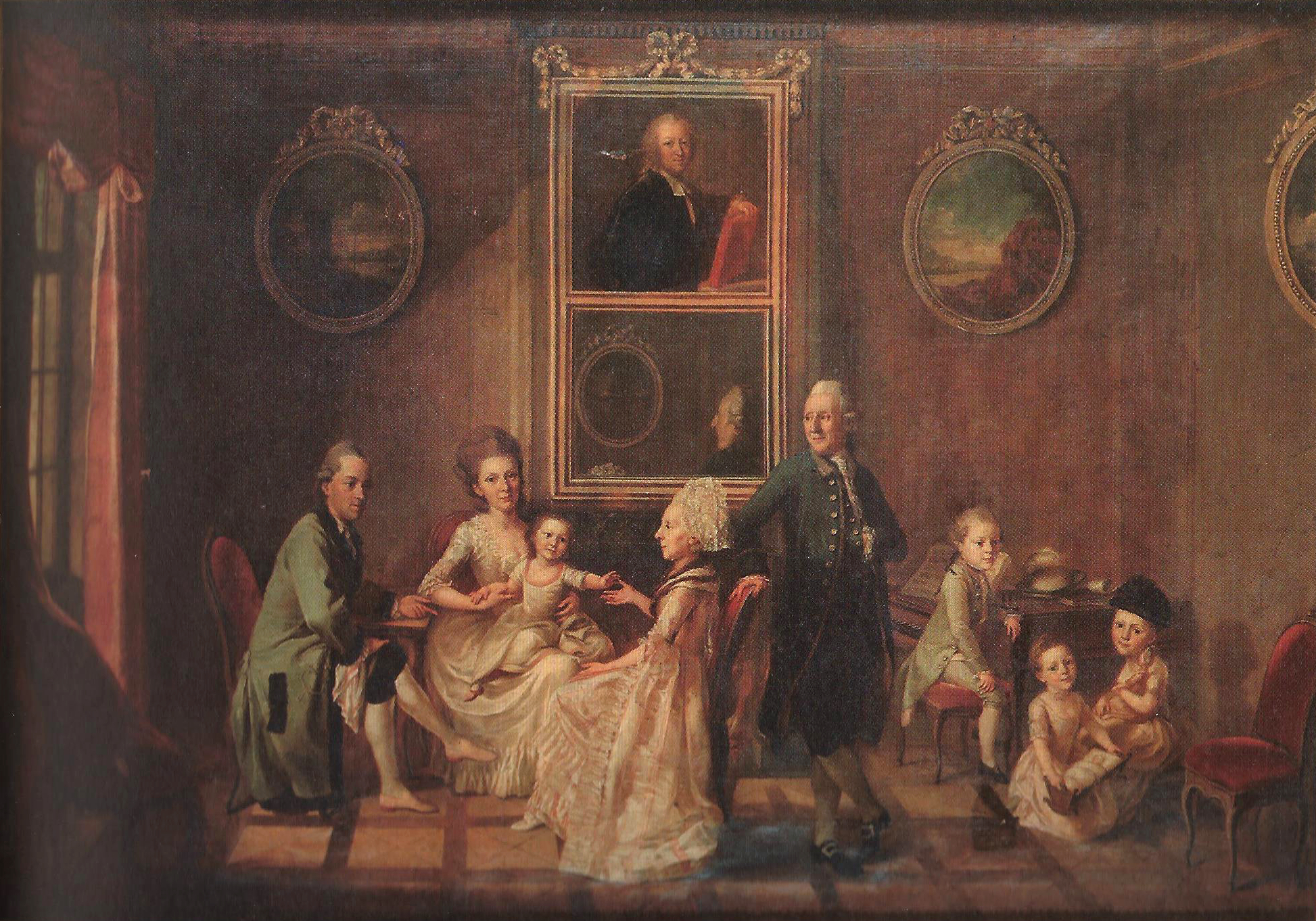 Bildnis der Familie des Samuel Kirchberger (1735-1786), zugeschrieben (zum Vergleich der Physiognomie siehe hier: Staatsarchiv Bern, T.E. 18).